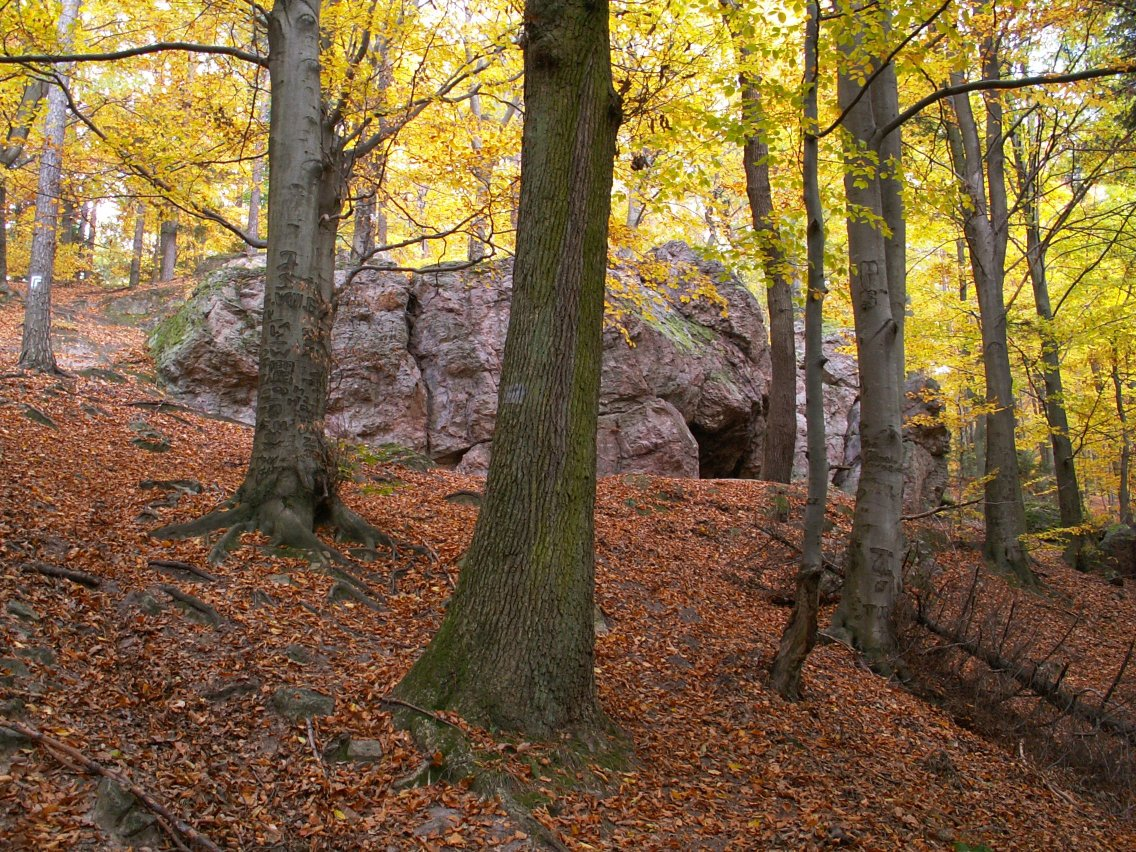 Rocks in Kamień Michniowski preserve (Świętokrzyskie voivodeship, Poland)